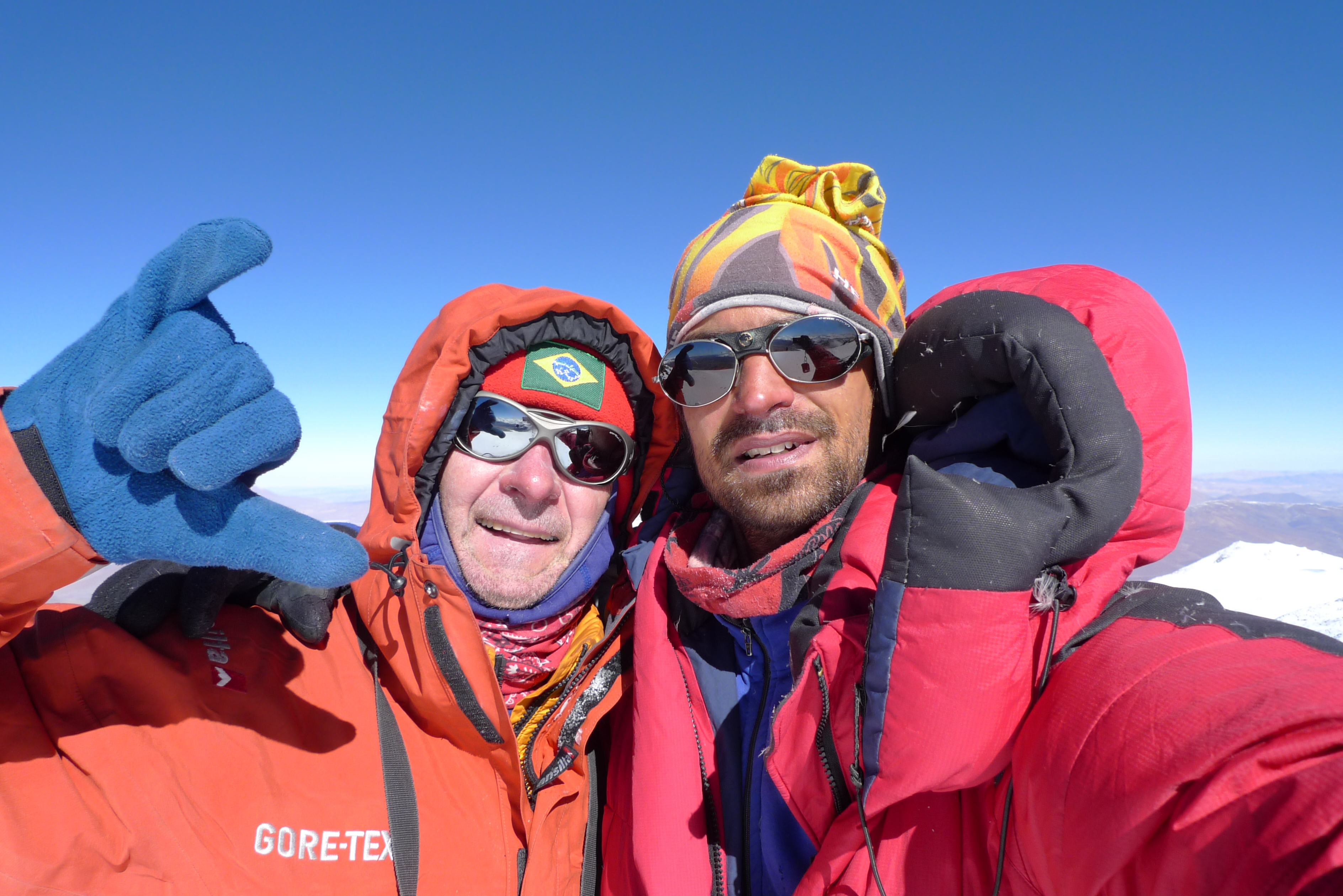 Waldemar Niclevicz montanhista brasileiro com Pedro Hauck no cume do Nevado Tres Cruces